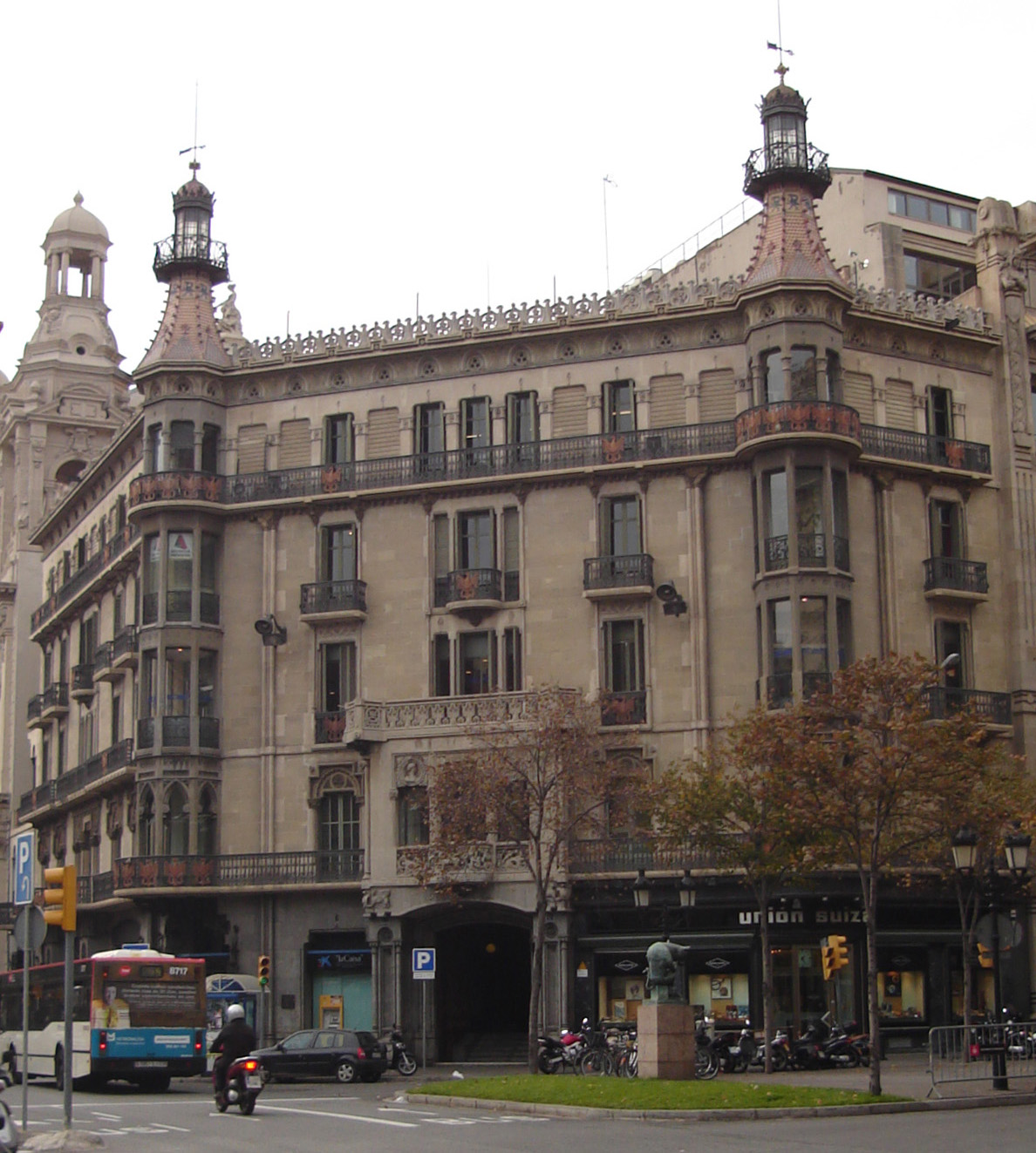 Casa Pia Batlló, Rambla de Catalunya 17, by Josep Vilaseca i Casanovas, 1891-96